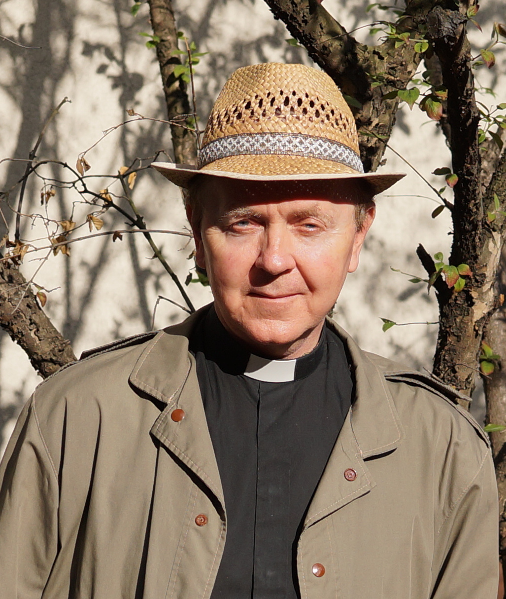 Janusz Adam Kobierski (ur. 24 grudnia 1947 w Wólce Łysowskiej koło Siedlec) – polski poeta, eseista, krytyk literacki, duchowny katolicki. Zdjęcie wykonane w Warszawie, 21 sierpnia 2014.